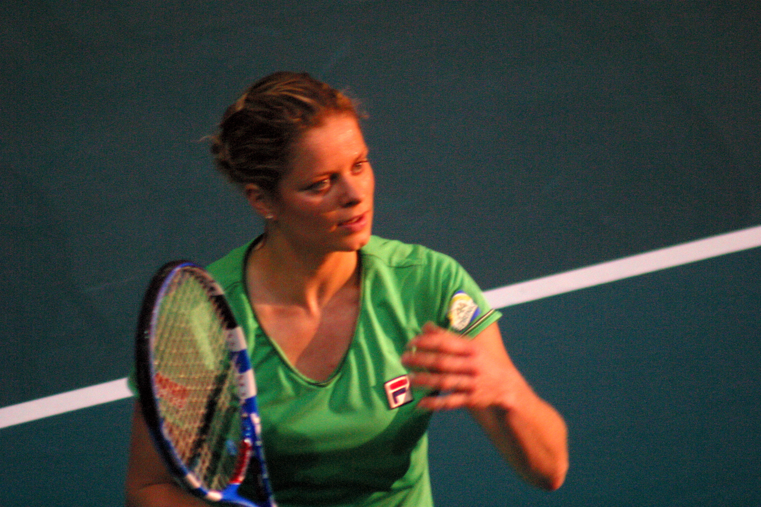 Kim Clijsters ; demi-finale de l'open GDF Suez Paris